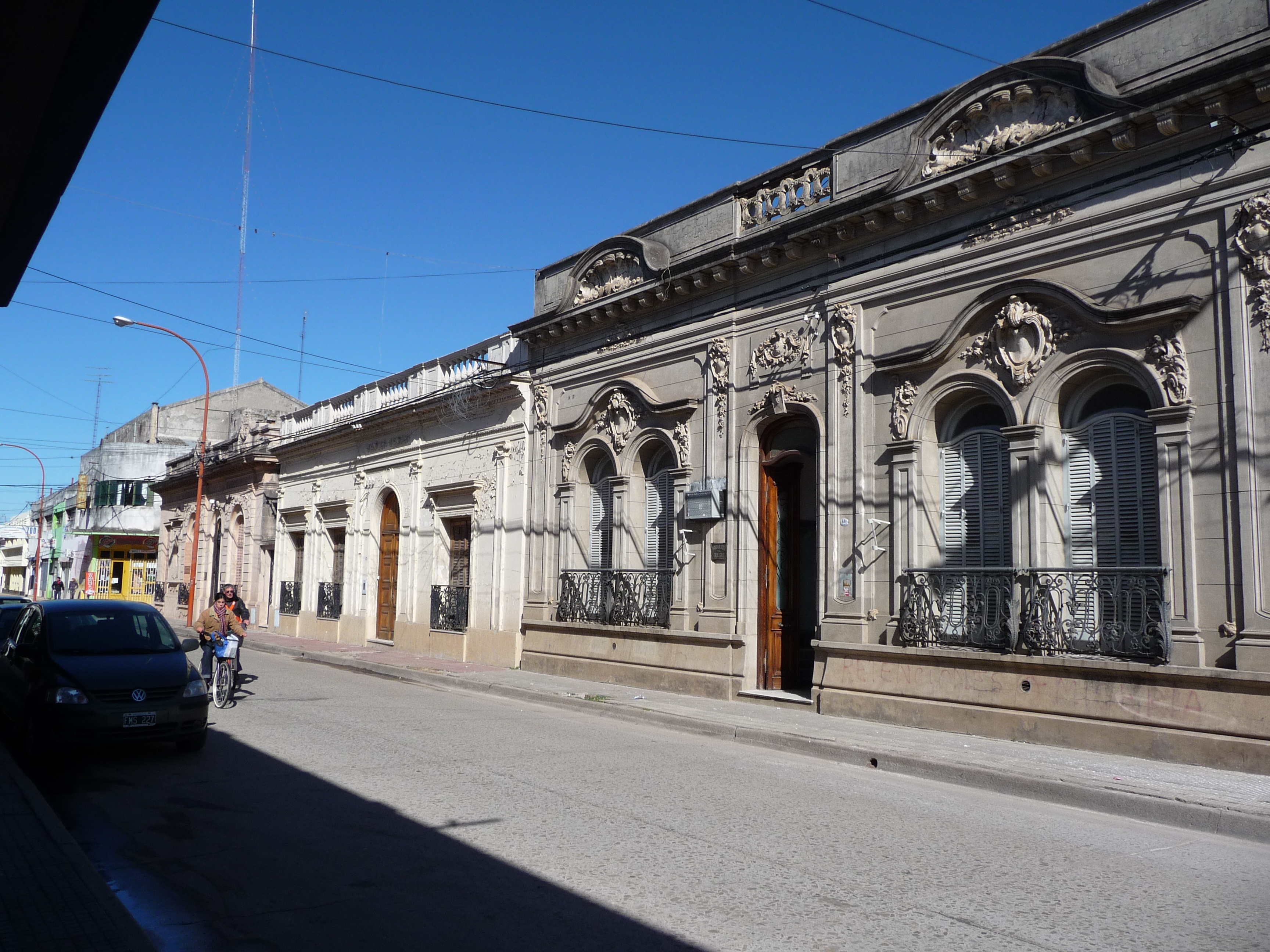 Calle de la localidad de Gualeguay, Provincia de Entre Ríos, Argentina.